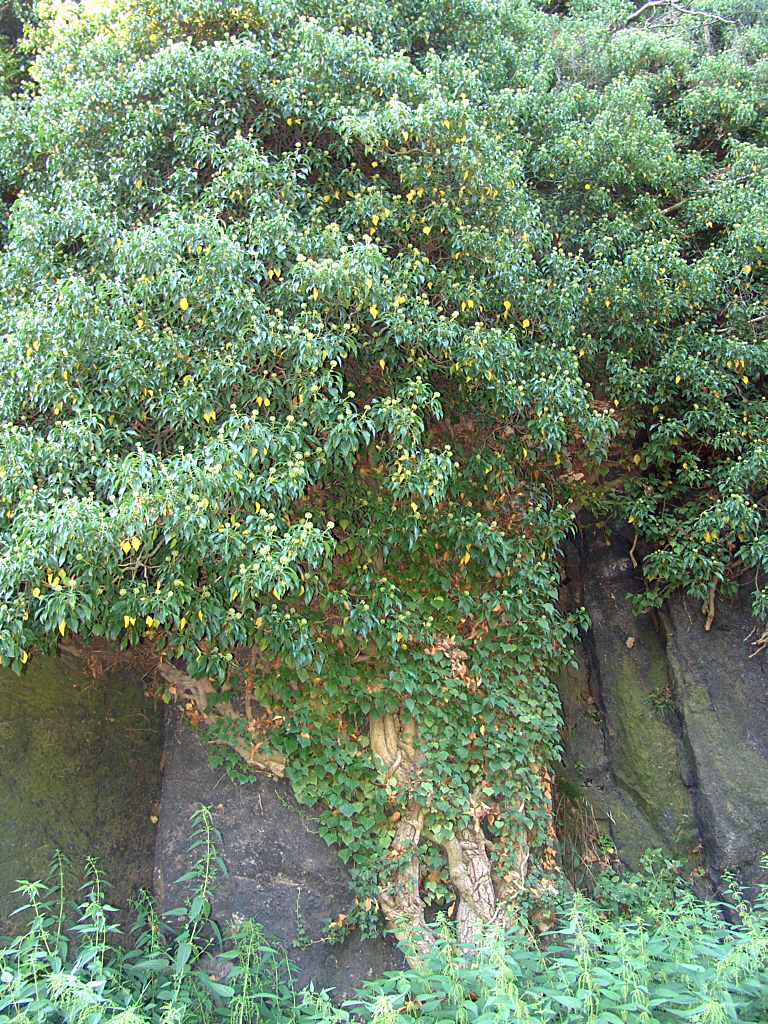 Unter Naturschutz steht dieser Efeu. Er klettert an einer Granitfelswand bei Loket in Tschechien (deutsch: Elbogen) bis zu 15 Meter empor. (Foto von 2005) Fotograf: Walter J. Pilsak, Waldsassen Copyright Status: GNU Freie Dokumentationslizenz